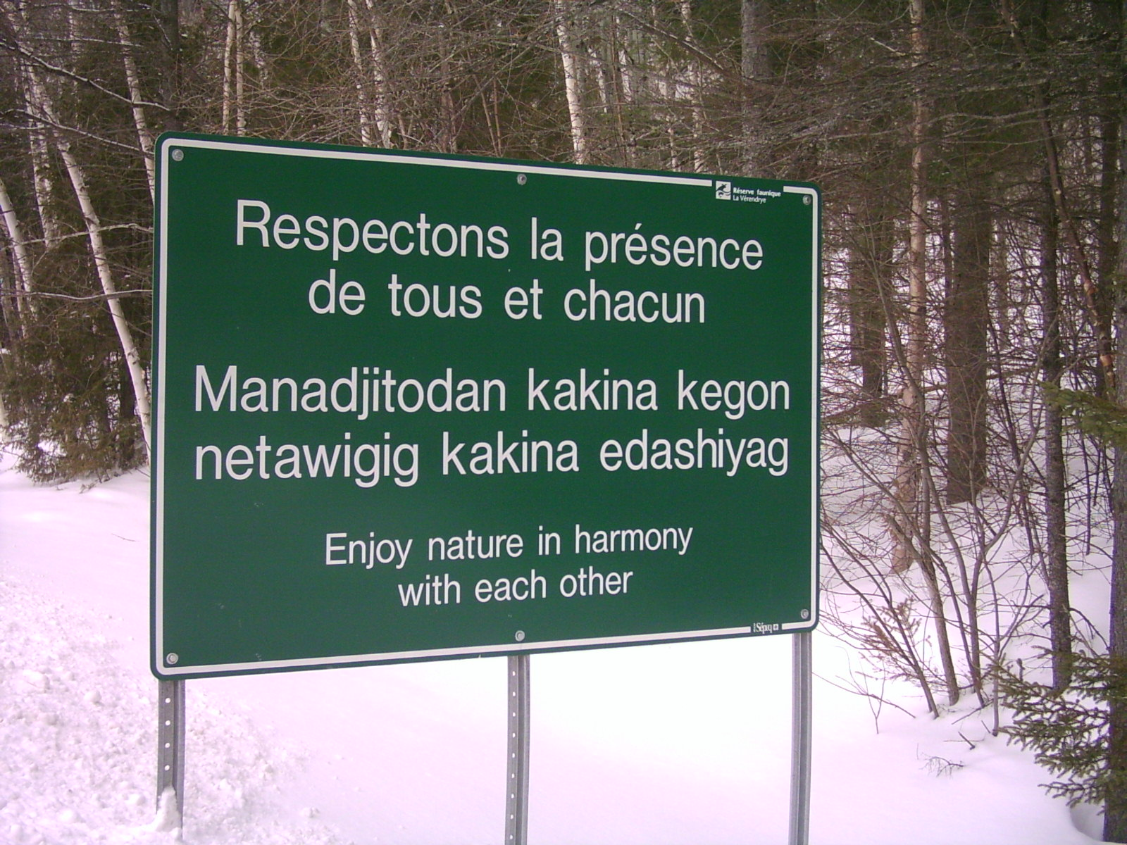 Panneau trilingue dont la langue algonquine à la Réserve faunique La Vérendrye au Québec. "Manàdjitòdan kakina kegòn netàwigig kakina e-dashiyag" signifie littéralement "Soyez doux avec toutes choses de la nature pour chacun."